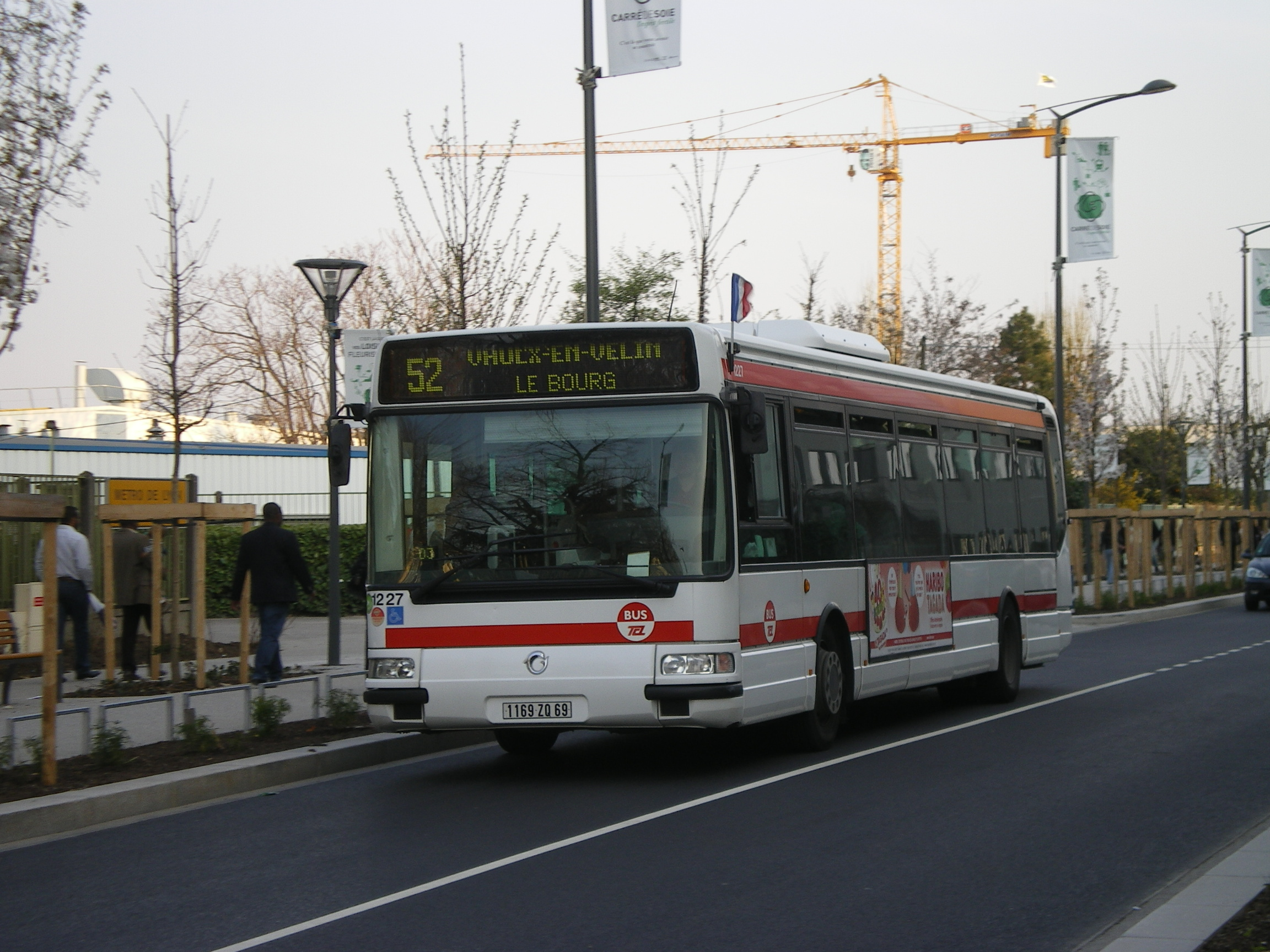 Un Irisbus AgoraLine €3 du réseau TCL, sur la ligne 52, à La Soie.